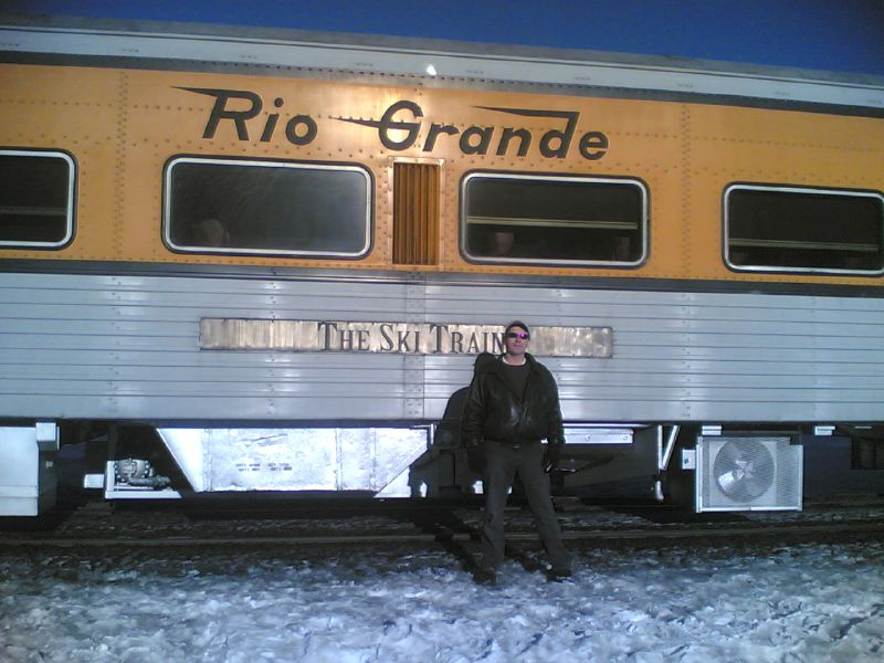 Winter Park Ski Train